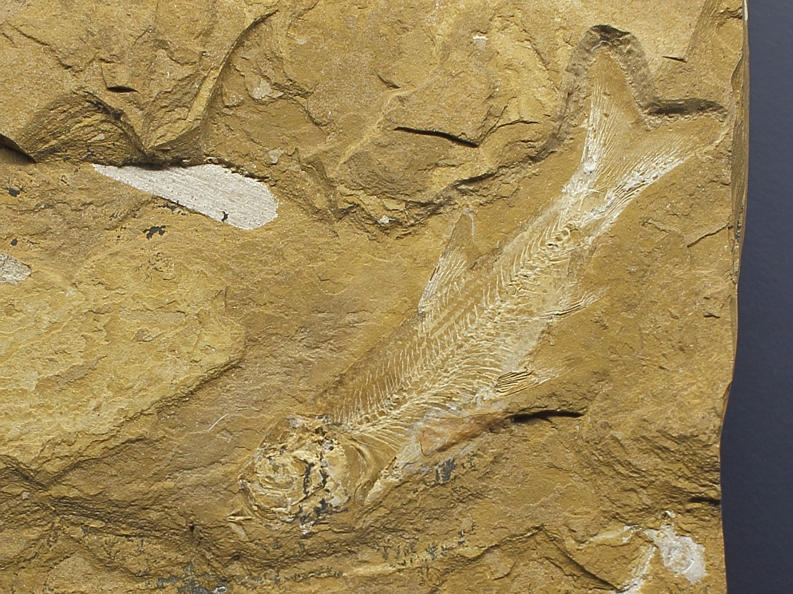 Leptolepis talbragarensis (Woodward, 1895), wird heute in die neue Gattung Cavenderichthys (Arratia, 1997) gestellt. Fundort: Talbragar River, New South Wales. Ausgestellt im Urzeitmeer-Museum im Aquarium Wilhelmshaven.